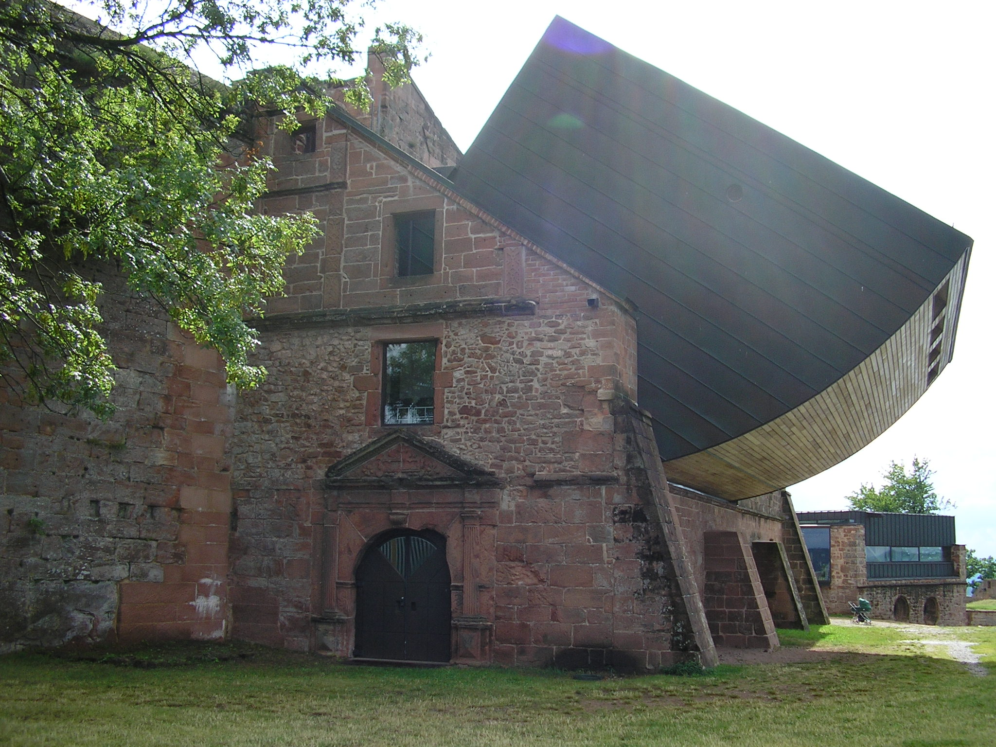 vue du chateau de Lichtenberg